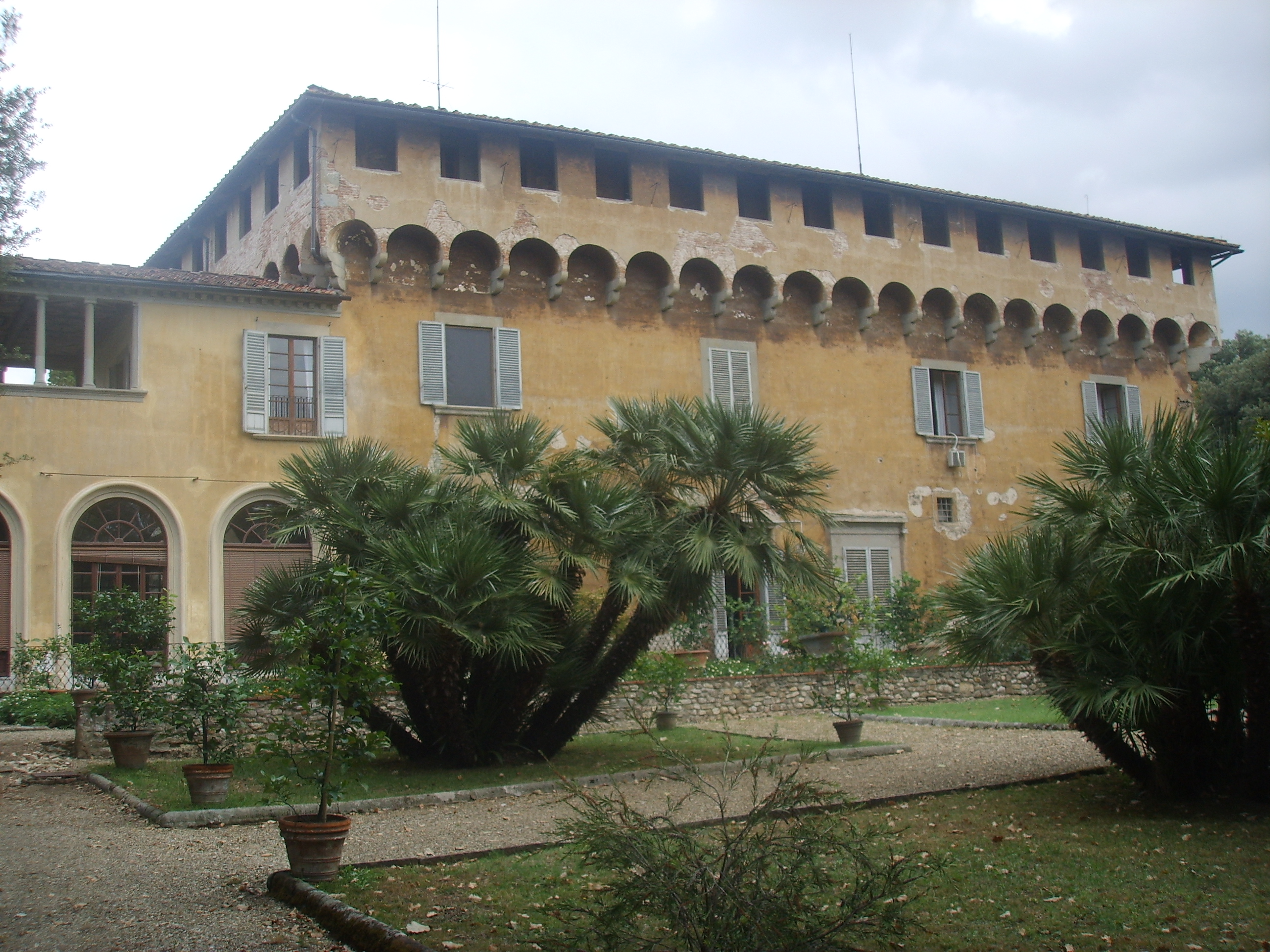 Villa Medicea di Careggi, in Florence, Italy